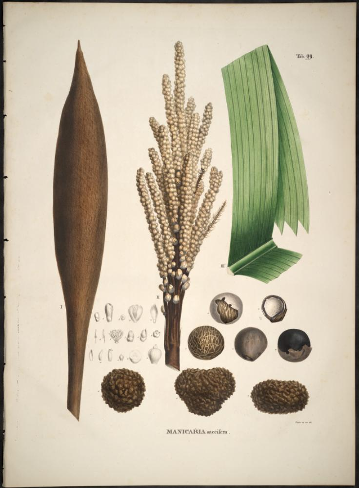 Manicaria saccifera - sample plate from '